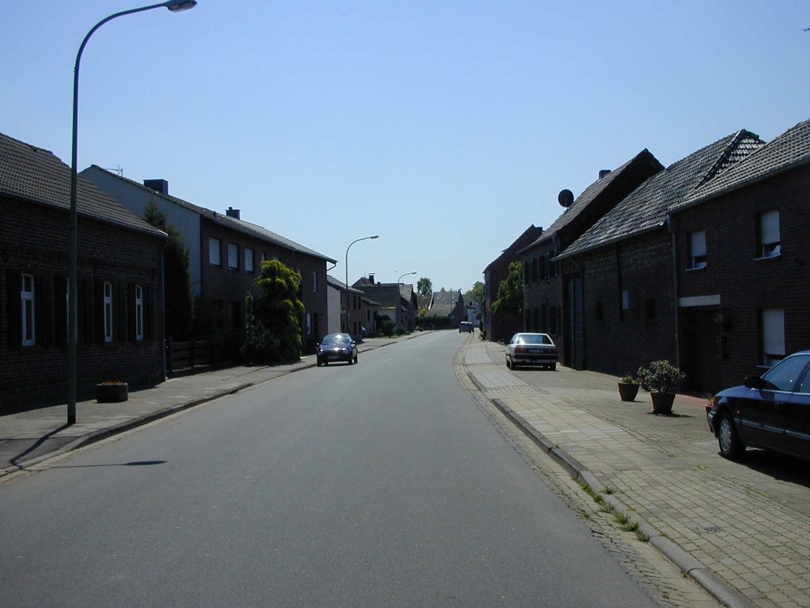 freigegeben durch das Presseamt der Gemeinde Nörvenich am 08.02.05, GNUF